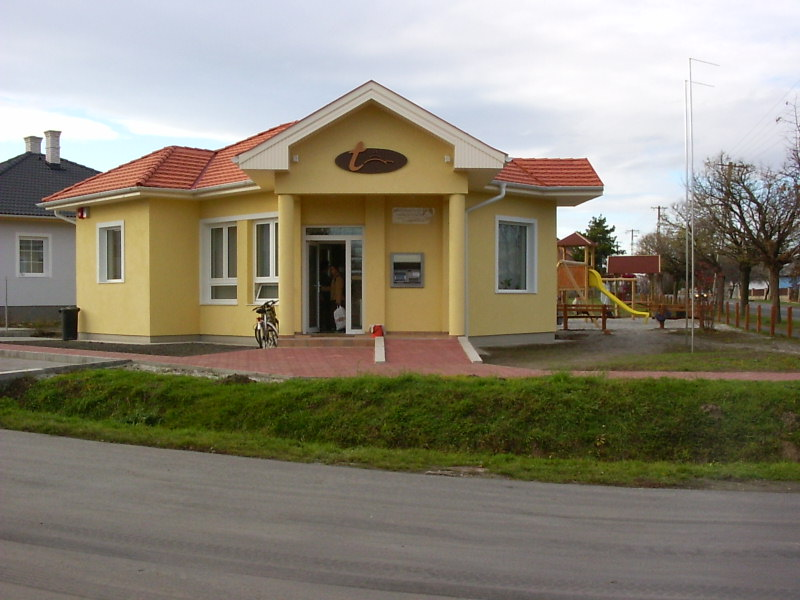 Takarékszövetkezet (Écs, Magyarország)